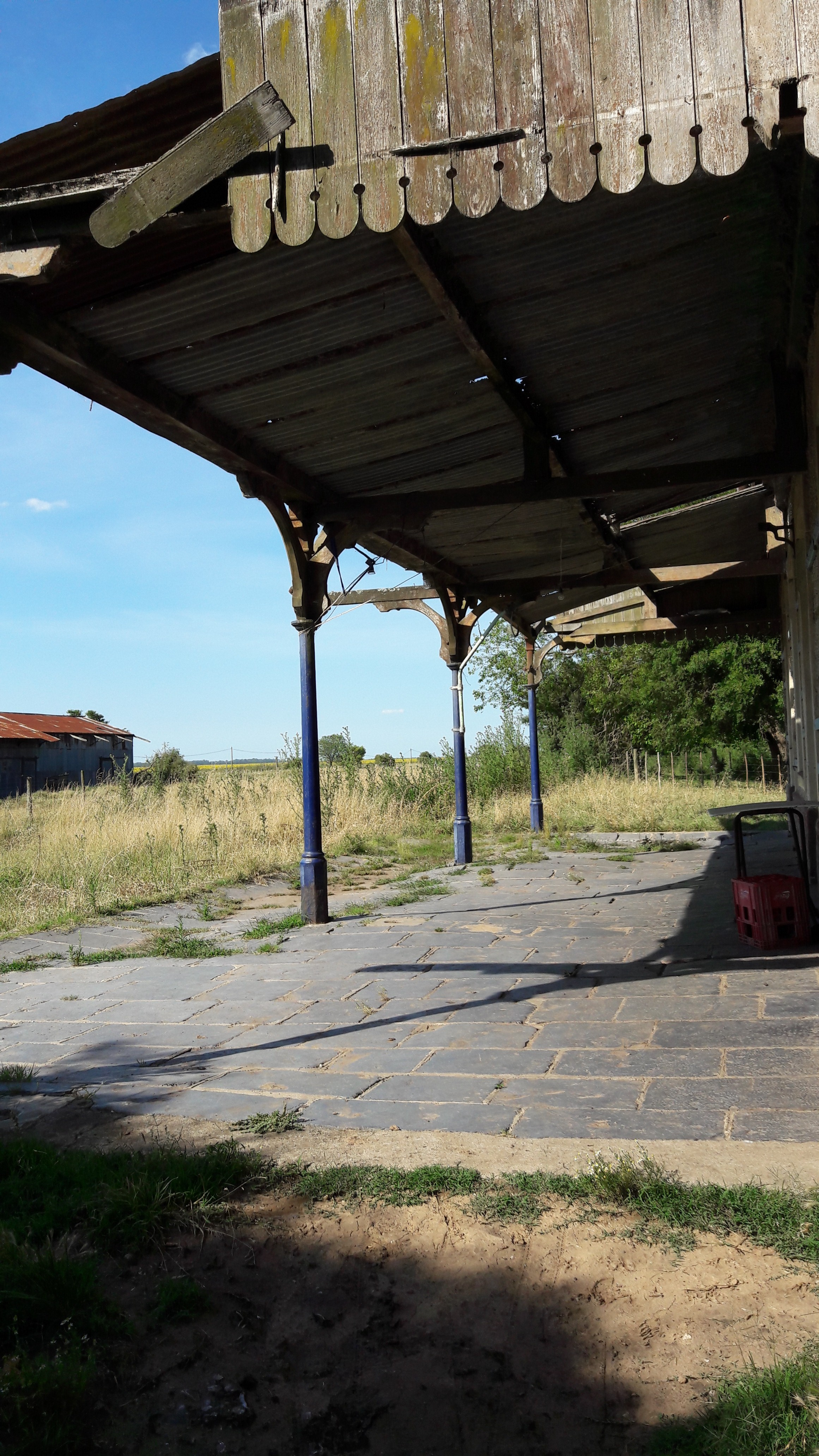 Vista del Andén